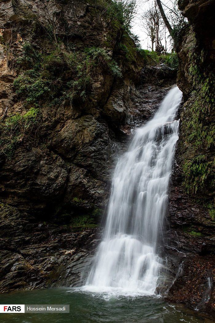 آبشار دودْوَزَن آبشار "دودْوَزَن" از آبشارهای زیبای استان گیلان است که در فاصله ۲۴ کیلومتری از شهرستان شفت، در منطقه کوهستانی و ییلاقی "سیاهْمِزْگی" قرار گرفته است. از آنجا که پژوهش های دقیقی در مورد این آبشار صورت نگرفته ارتفاع دقیق آن مشخص نیست، اما حدود ۵۴ متر تخمین زده شده است. پوشش جنگلی انبوه، رودخانه های پرجوش و خروش، چشمه های گوارا و زیبایی های کم نظیر در حوالی این آبشار، از تماشایی ترین مناطق ایران هستند. آب این آبشار از چشمه ای در نزدیکی آن با نام چشمه "دودْوَزَن" تامین شده و پس از جاری شدن و سقوط از ارتفاع آبشار به رودخانه ای ریخته و روستاهای پایین آبشار را سیراب می کند. در خصوص قدمت این آبشار بر اساس تحقیقات زمین شناسان عنوان می شود که آبشار "دودْوَزَن" چیزی حدود ۱۰۰ تا ۱۵۰ سال قدمت دارد. قرار گیری این آبشار در میان جنگلی انبوه و راه دسترسی مناسب، از دلایل جذب گردشگر به این منطقه است.